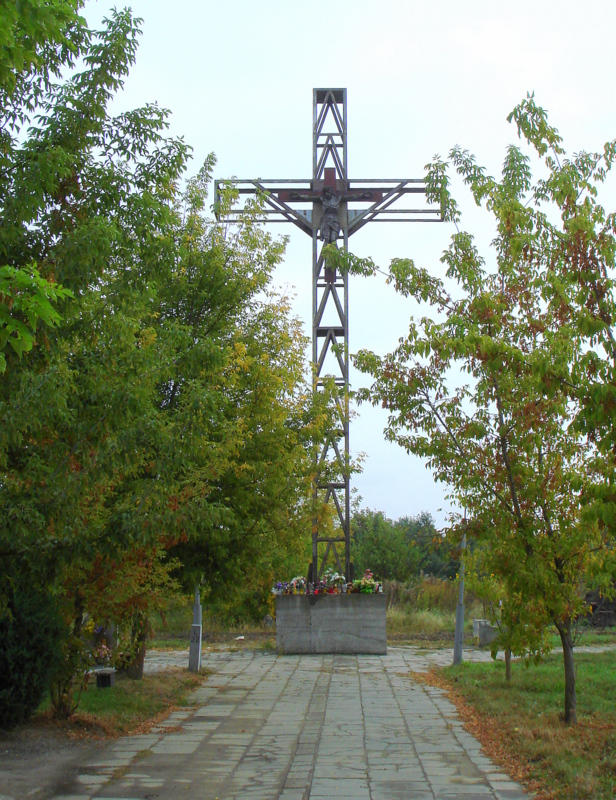 Wrocław, cmentarz parafialny przy ul. Bardzkiej